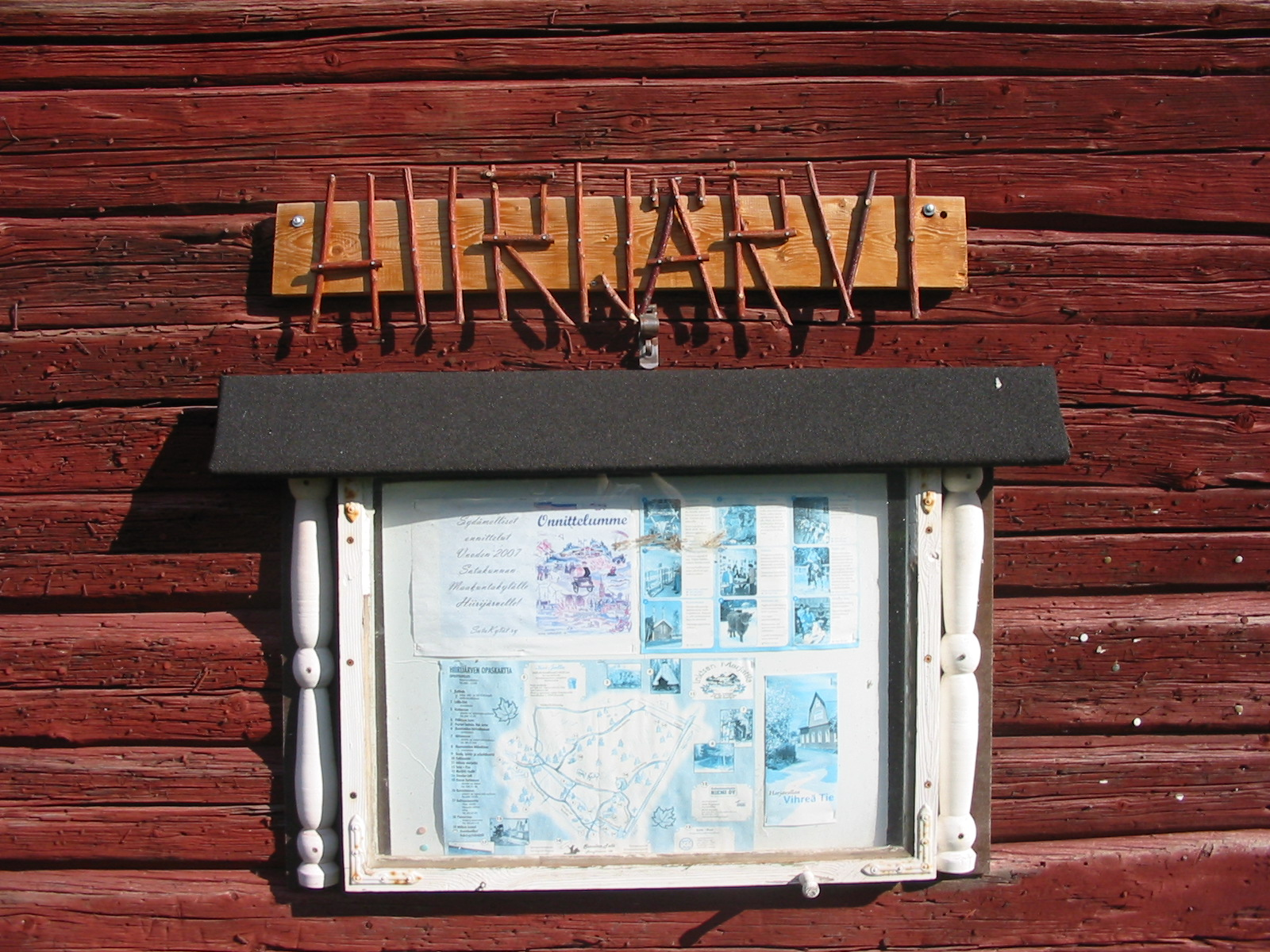 Hiirijärven kylän ilmoitustaulu kylänraitin varressa olevan aitan seinässä.